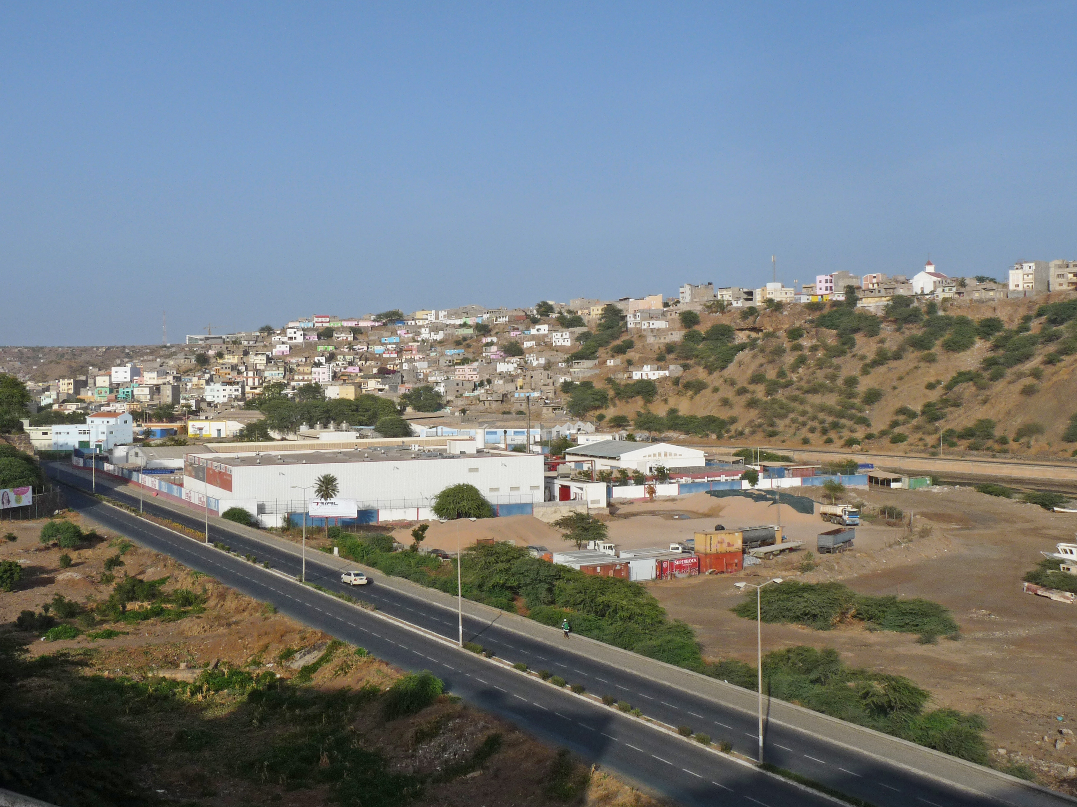 Praia (Cap-Vert) : route à quatre voies